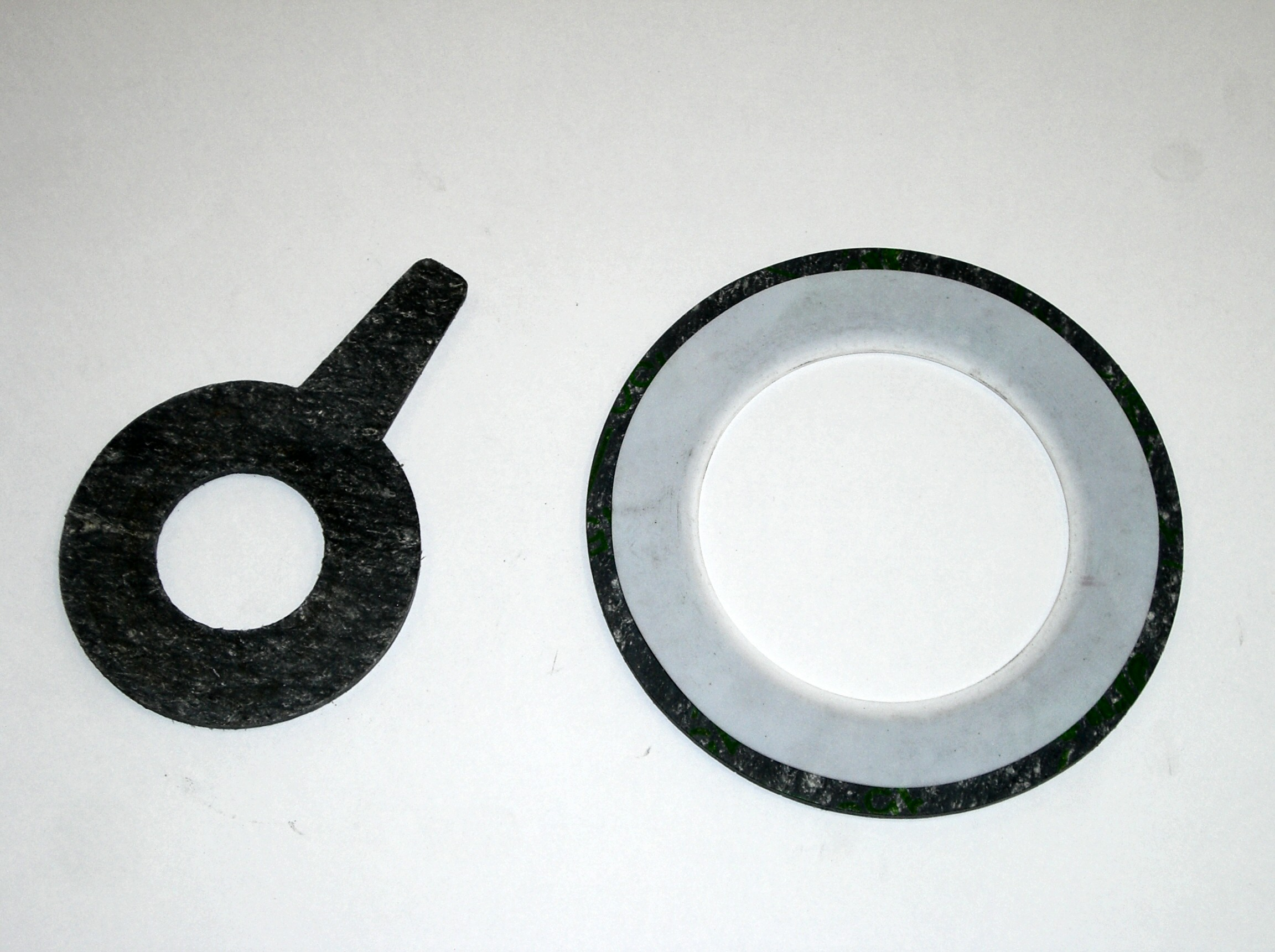 (Seal_(mechanical)); シール (シール (工学))左は耳つき、右はPTFE包みガスケット